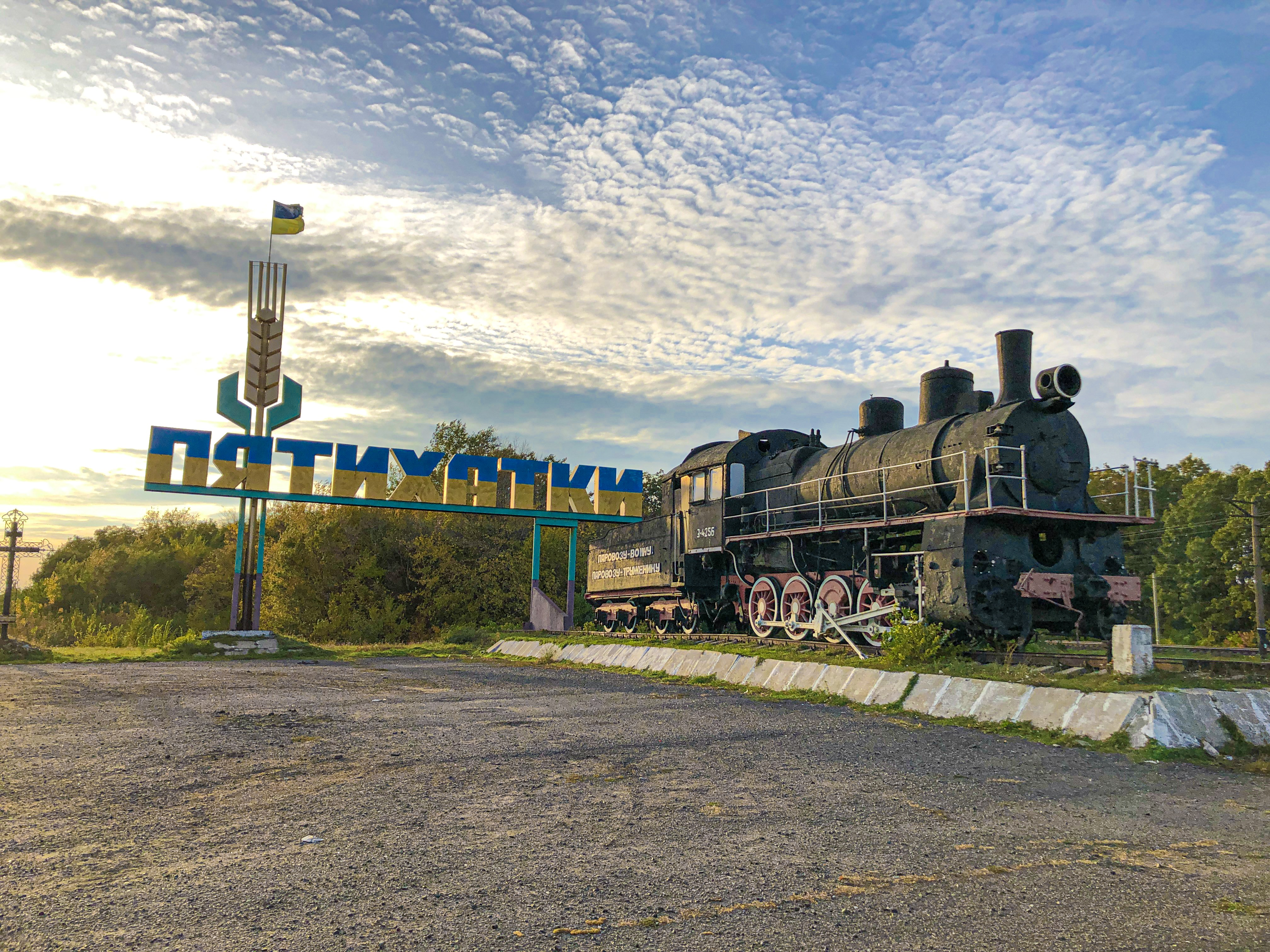 Фото памятника Паровозу - воину, паровозу - труженику